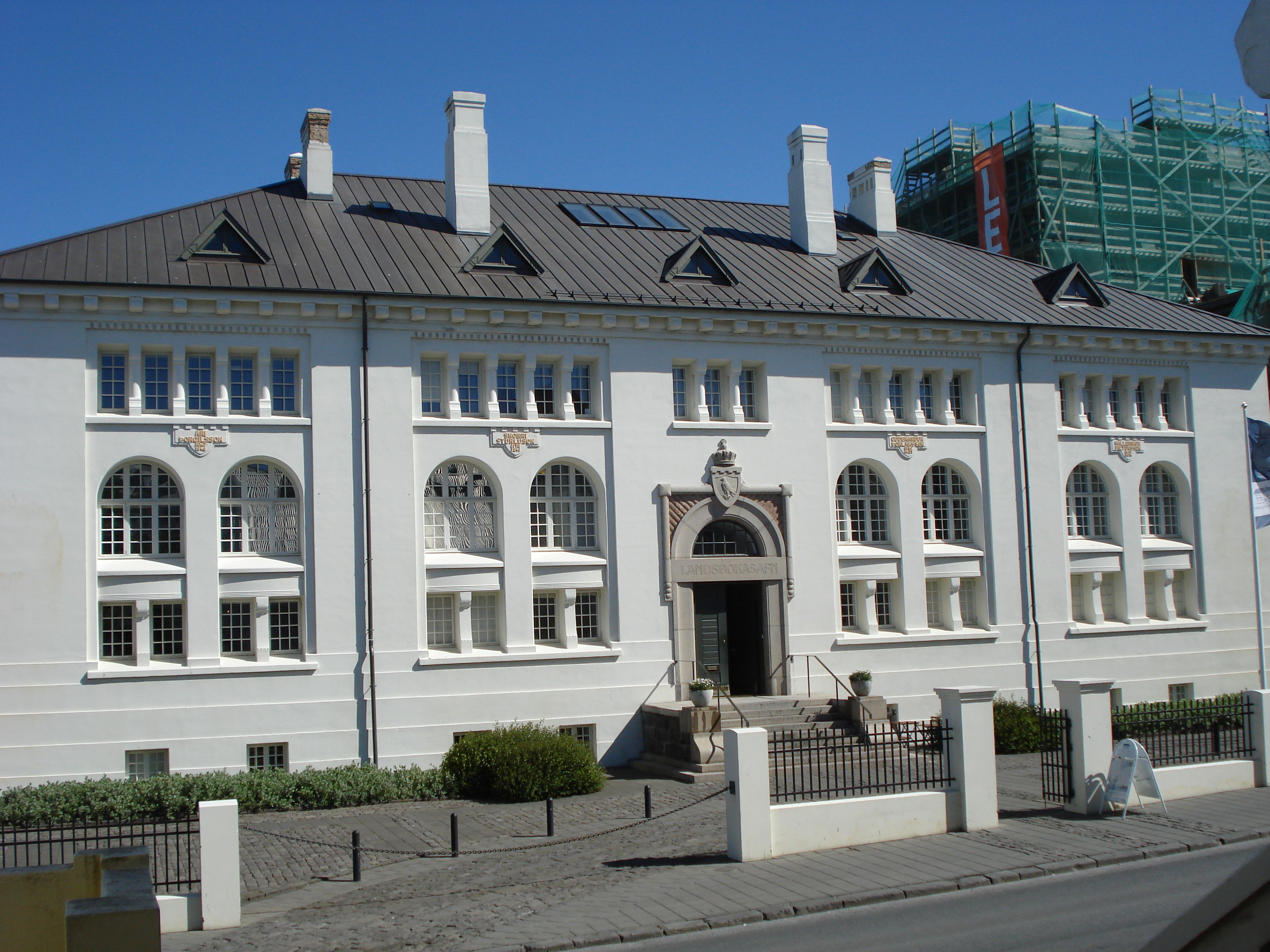 Landsbókafsafn, Old national Library, Reykjavik